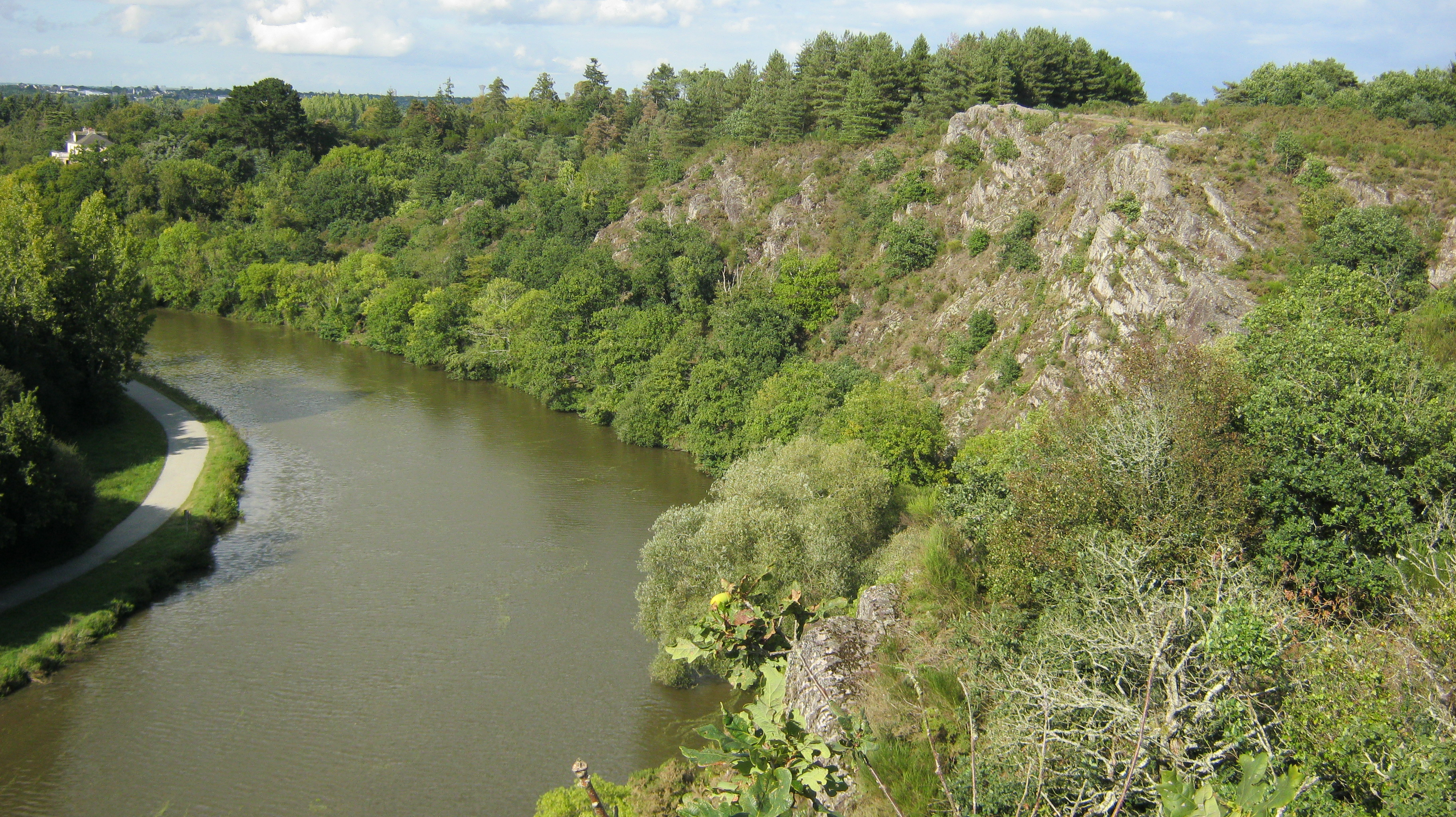 cluse du Boël